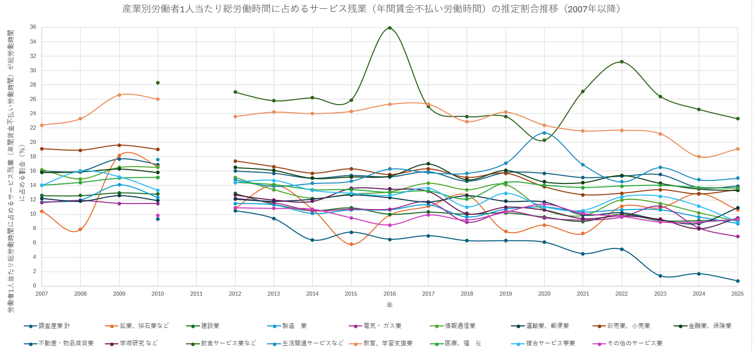 2007年以降の産業別労働者1人当たり賃金不払い労働時間が総労働時間に占める割合の推移